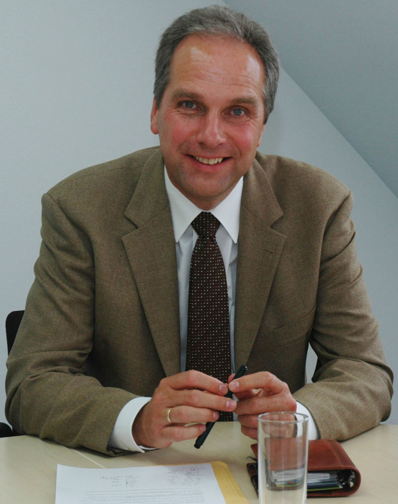 Michael Diener, Foto von Medienmagazin pro